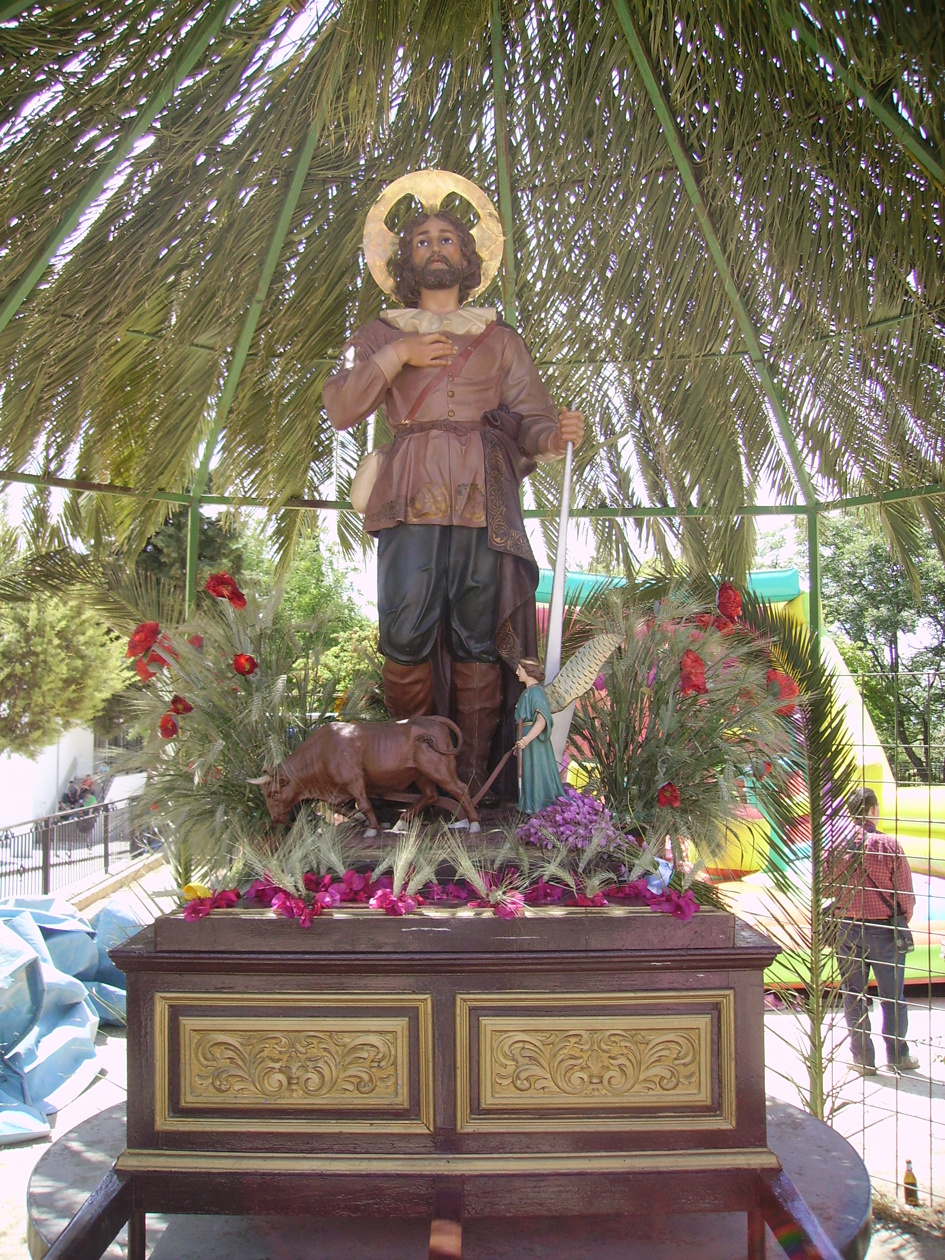 San Isidro en la Romería de Montalbán de Córdoba (España).